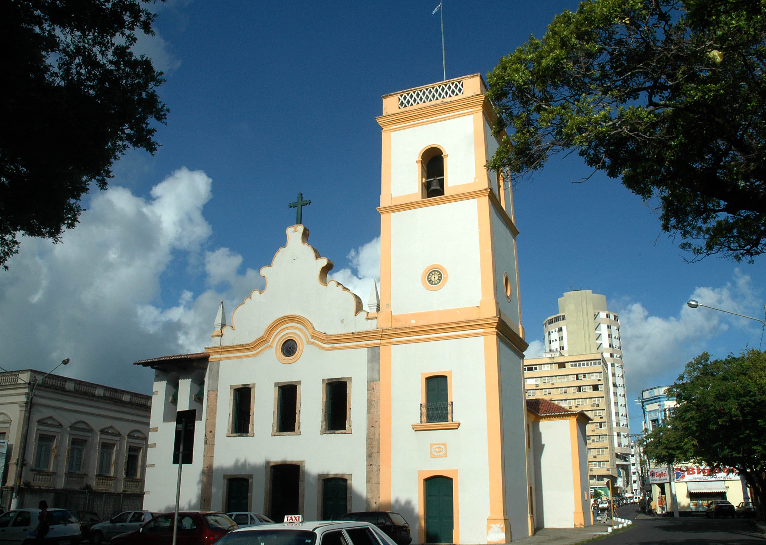 Igreja de Nossa Senhora da Apresentação natal (catedral velha ou igreja da matriz) Natal-RN